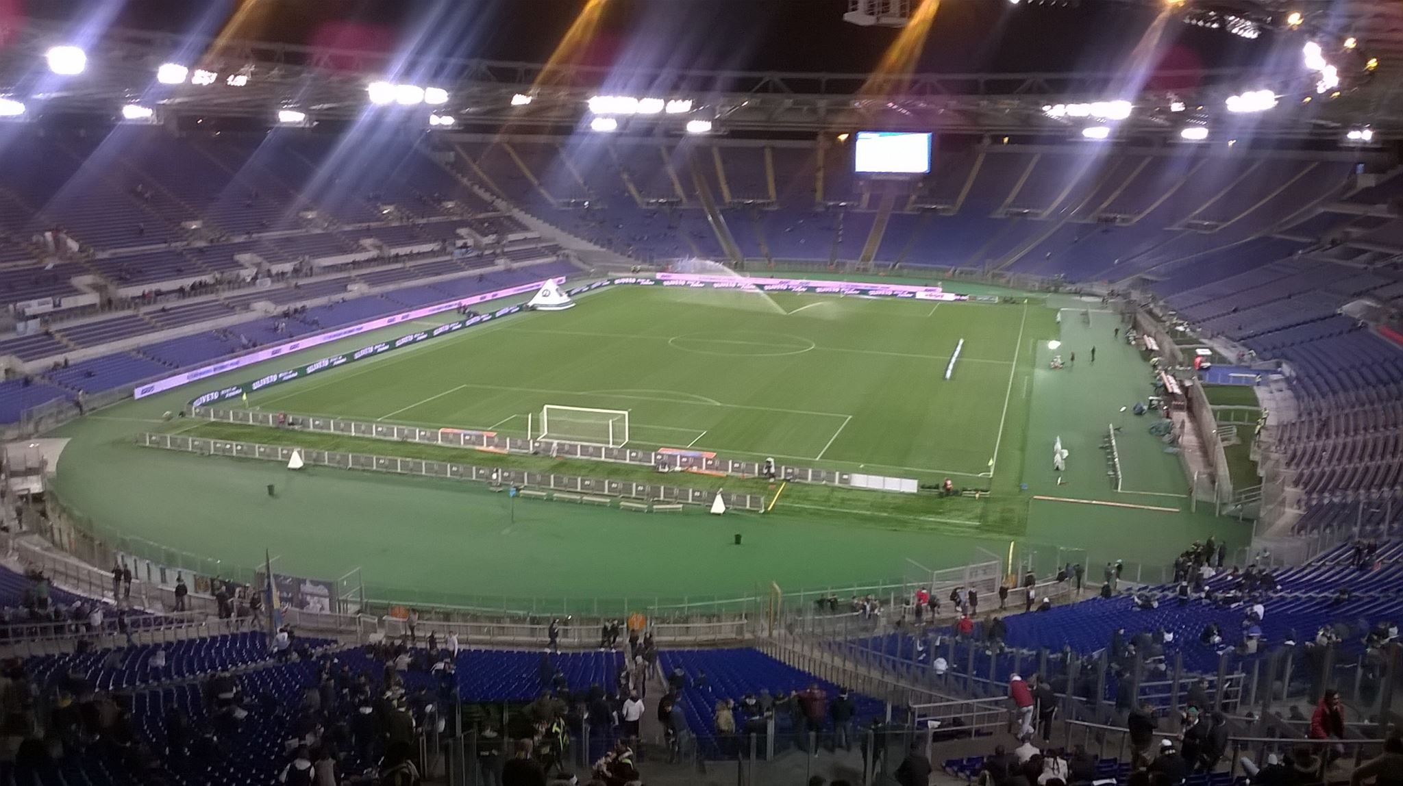 Stadio Olimpico (Roma)